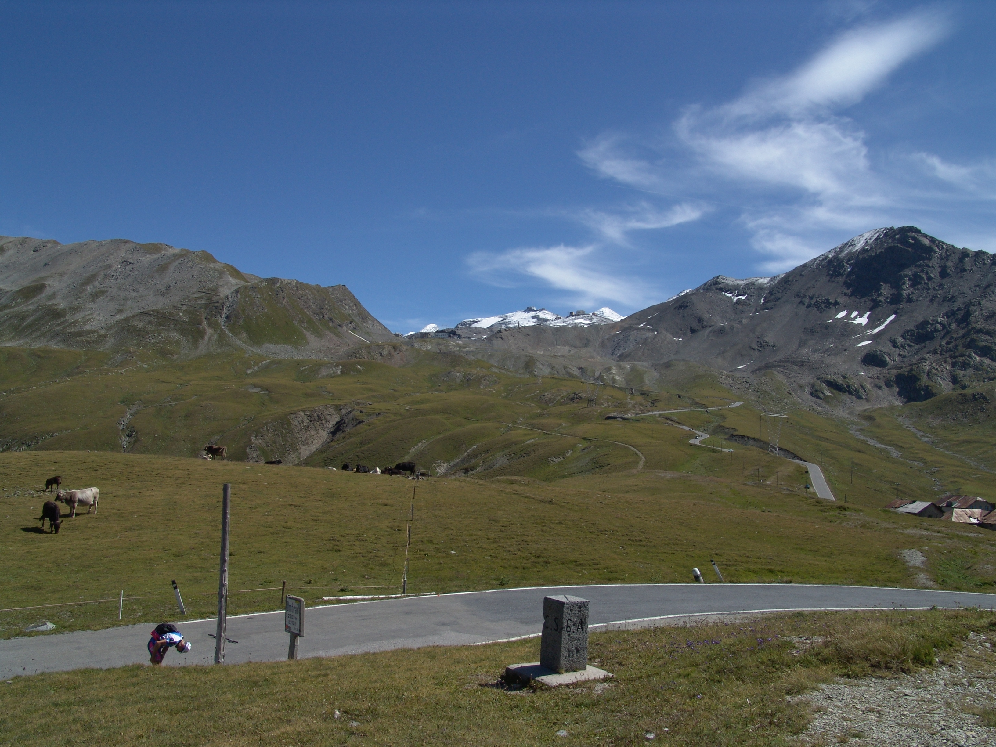 Umbrail Pass - Blick zum Stilfser Joch